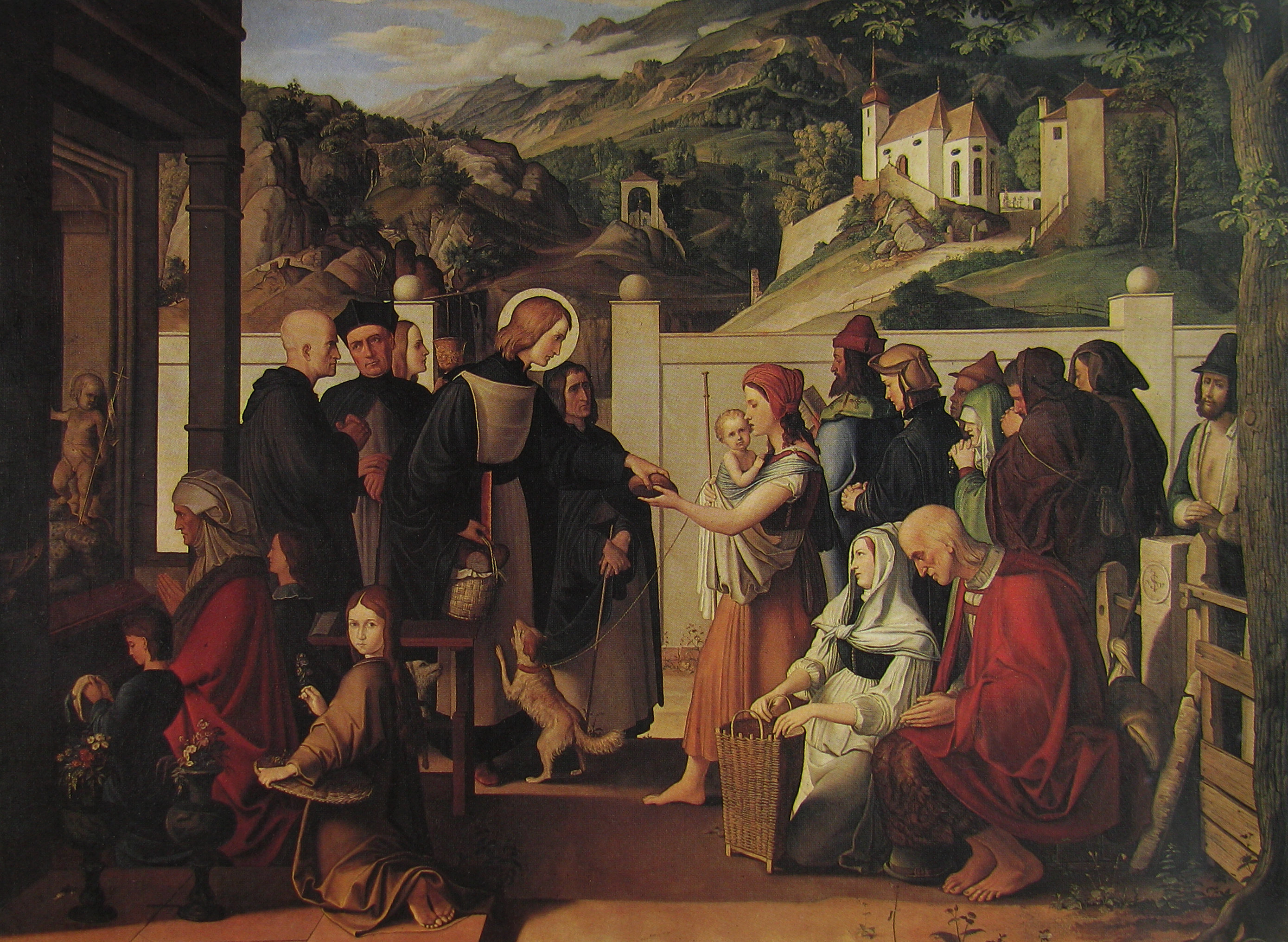 Der hl. Rochus, Almosen verteilend